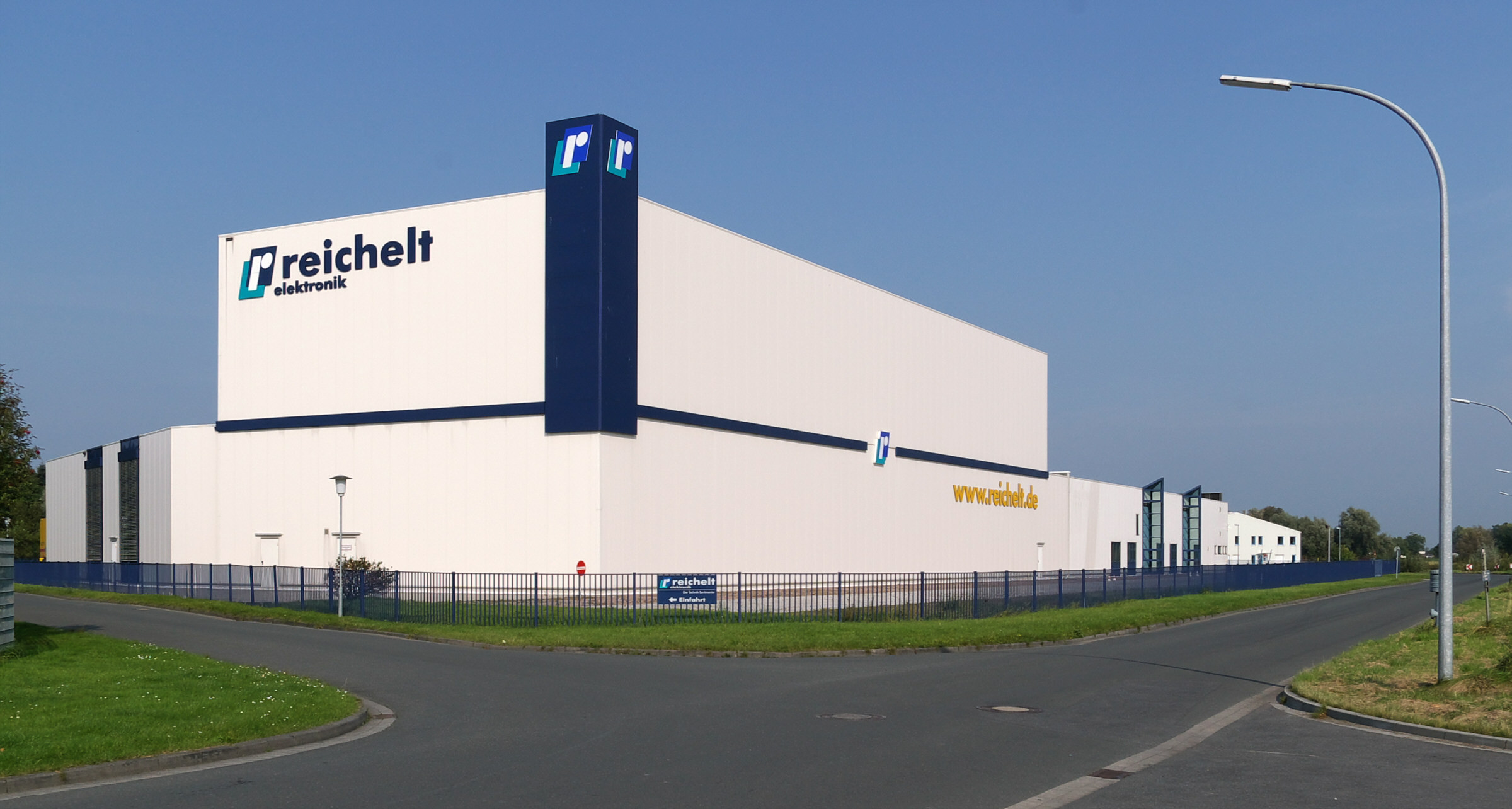 Elektronikversender Reichelt in Sande